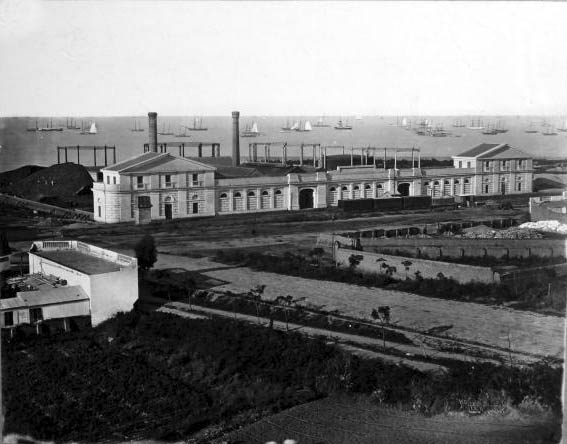 Edificio de la Compañía Primitiva de Gas, construido en 1856 en el Retiro, frente a la actual Avenida del Libertador, en el sitio de la actual Torre Monumental. Se ven las calles de la zona, aún de tierra, y el Río de la Plata antes de la construcción de Puerto Madero.